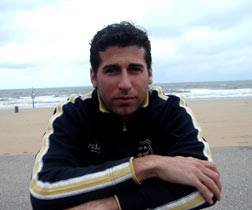 Via marcdehond.nl zelfgenomen foto